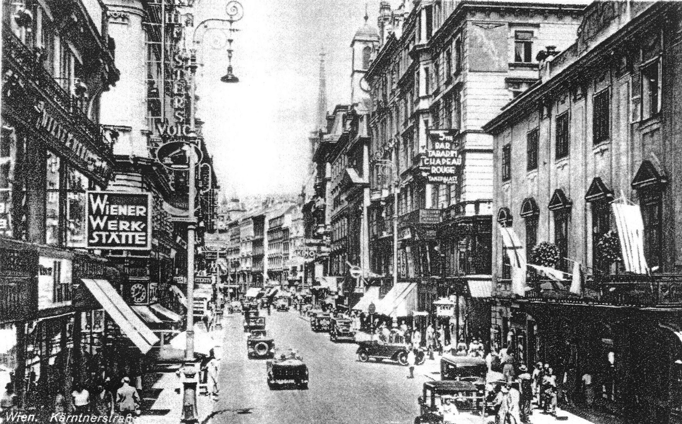 Ecke Kärntnerstraße/Annagasse Werbetafeln vom Tabarin und Chapeau Rouge Bar